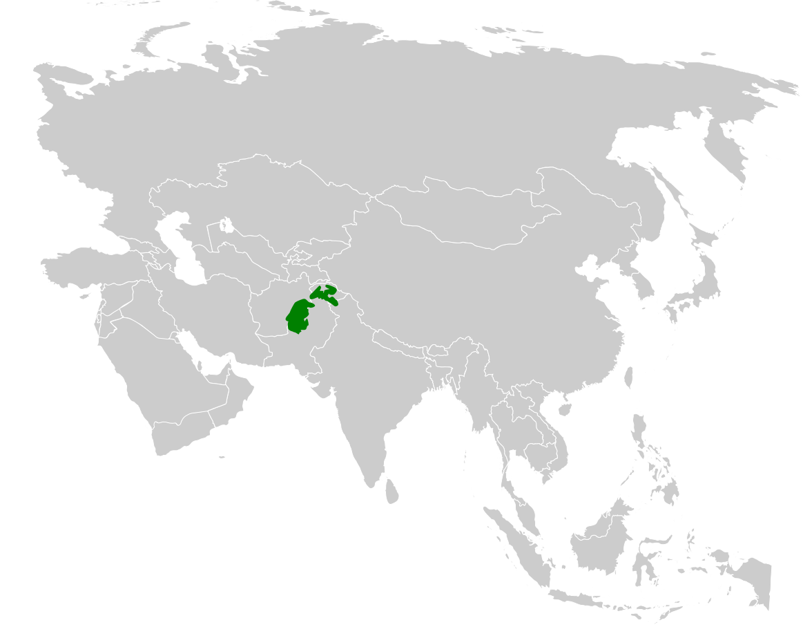 Aegithalos leucogenys distribution map, based on